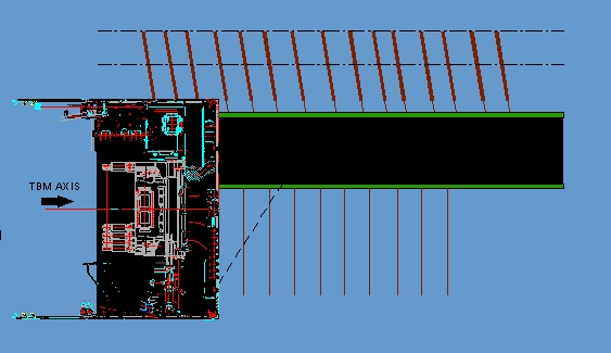 Feltáróalagút hosszmetszete